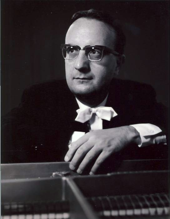 Foto gemaakt ten behoeve van hoes grammofoonplaat: Bram Boelee speelt werken van Chopin